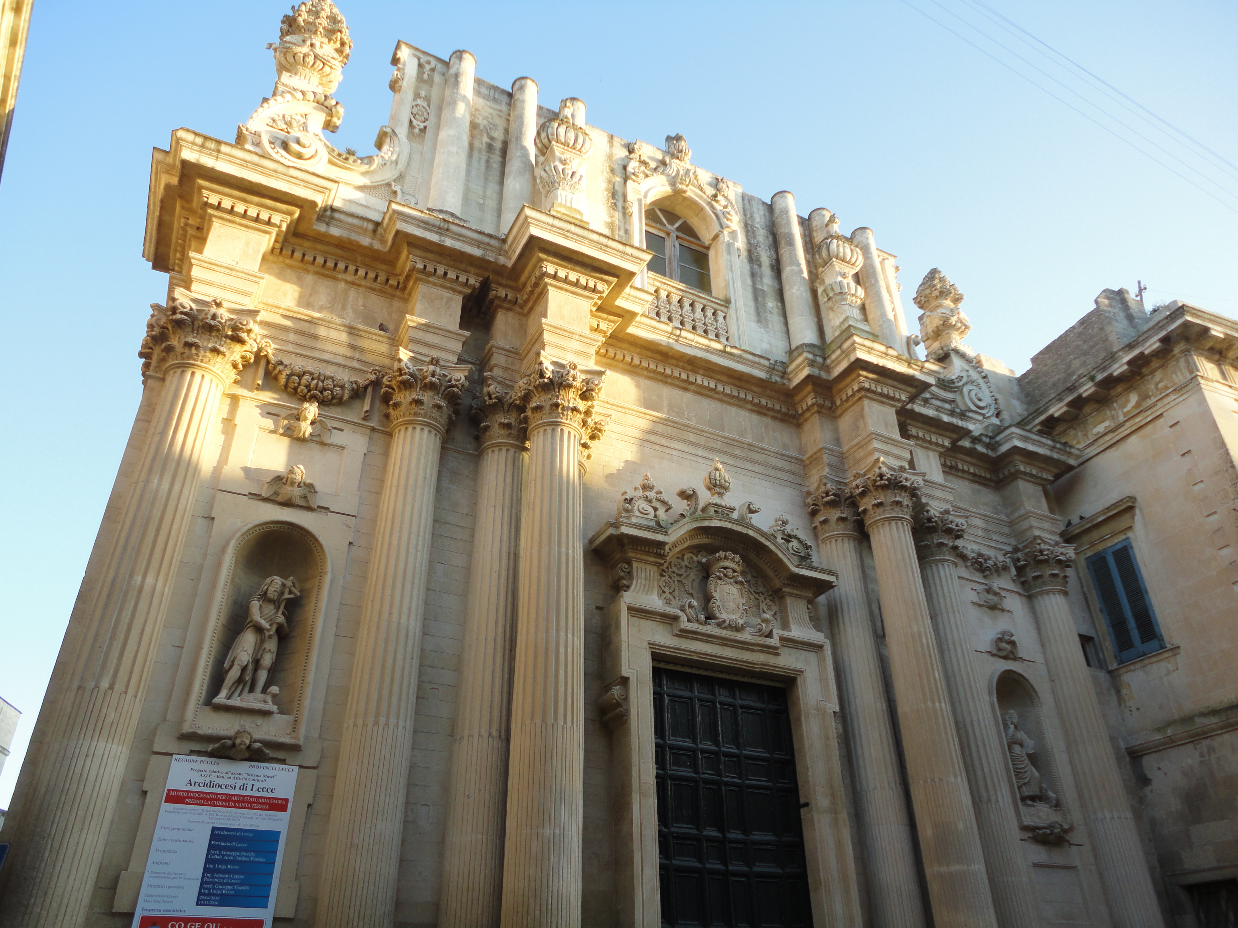 Chiesa di Santa Teresa, Lecce